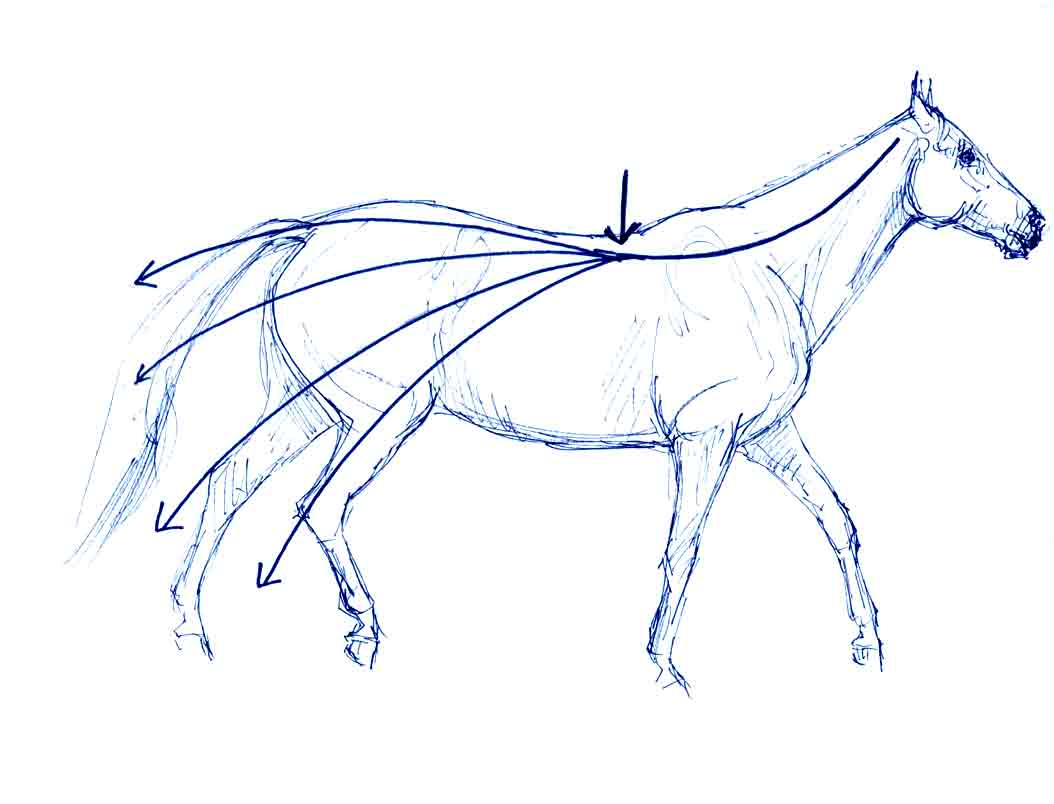 negative Wellenbewegung beim Pferd